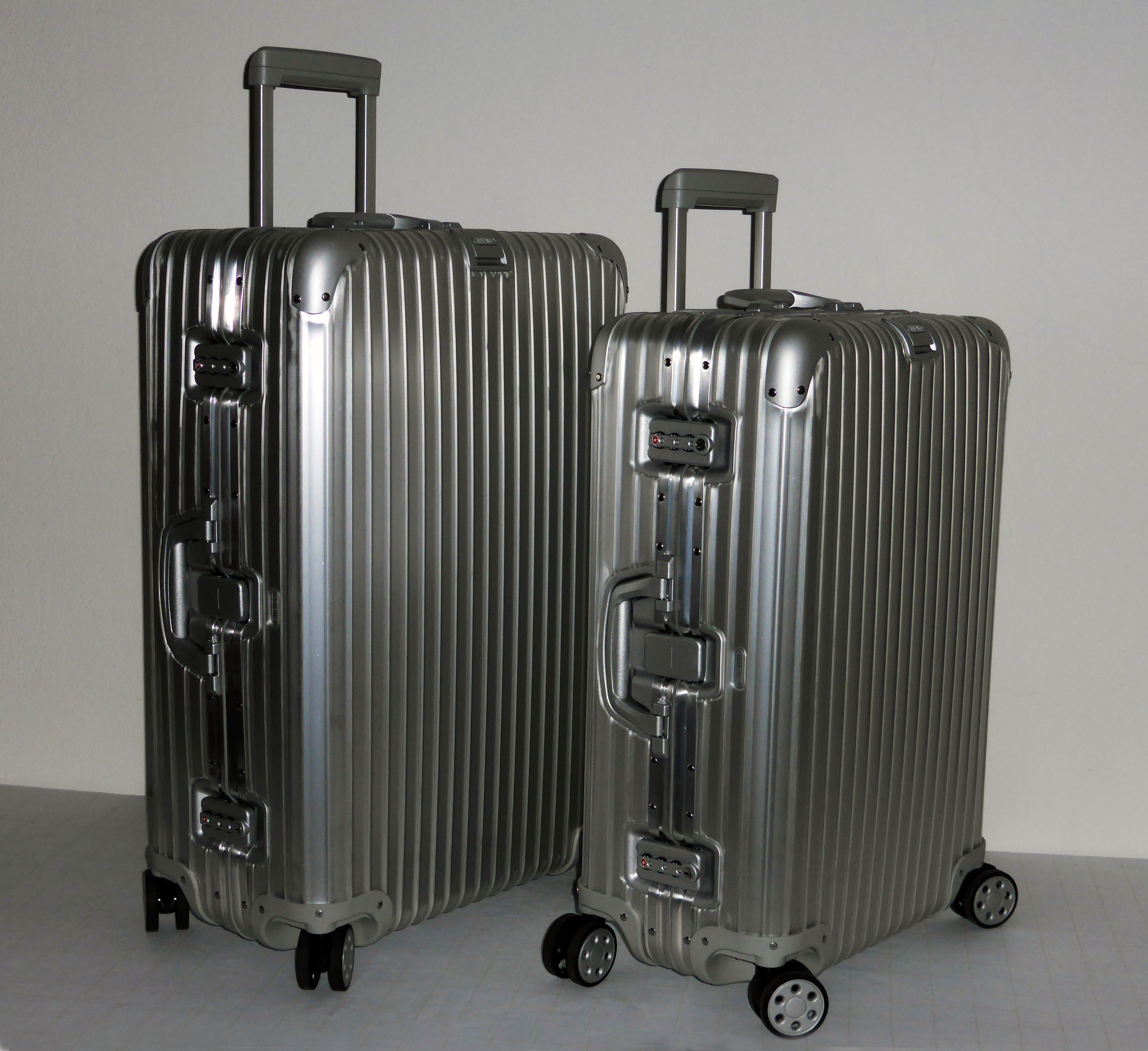 Rimowa-Koffer der Topas-Serie.